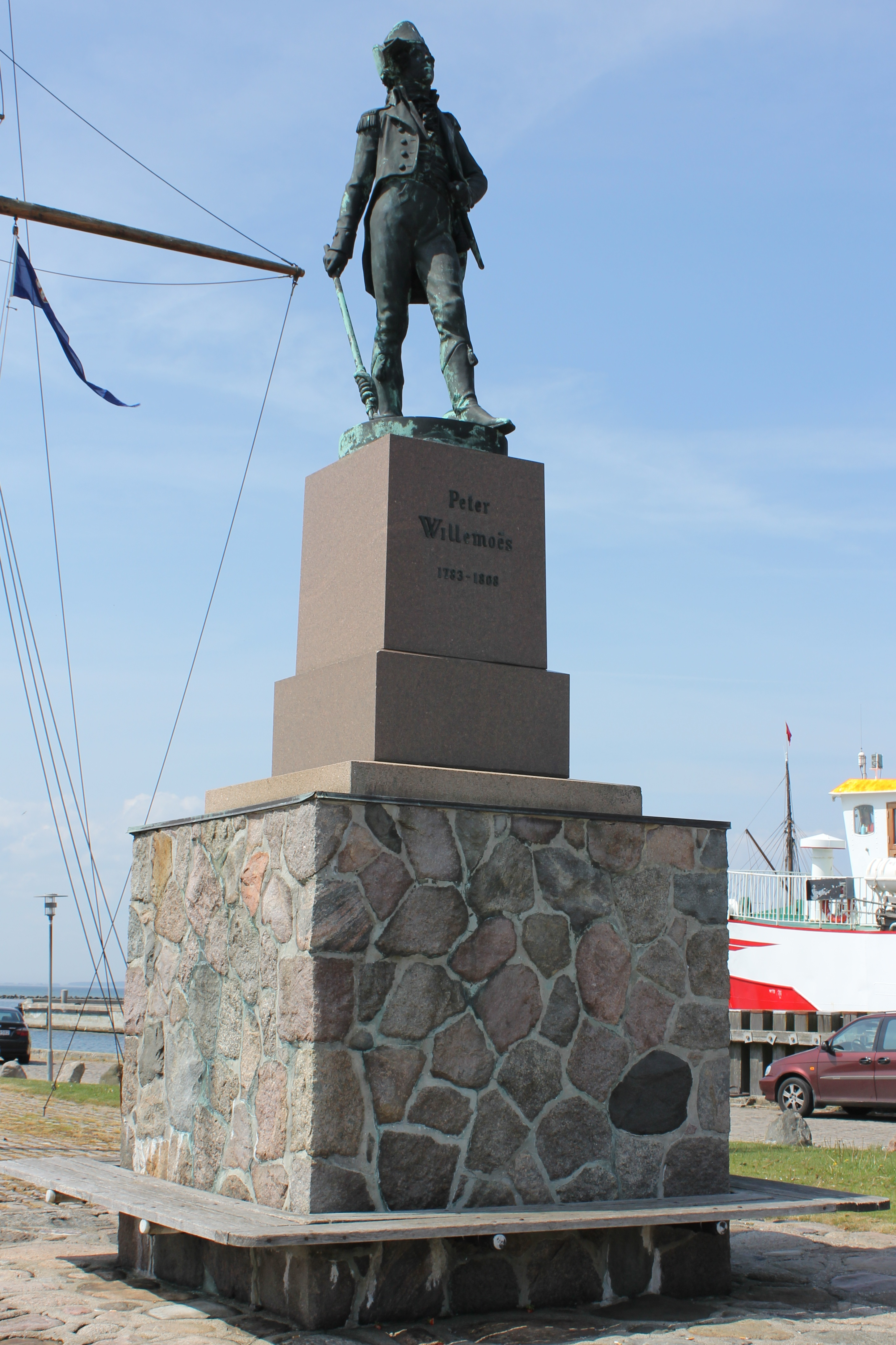 Statue af Peter Willemoes i fødebyen Assens